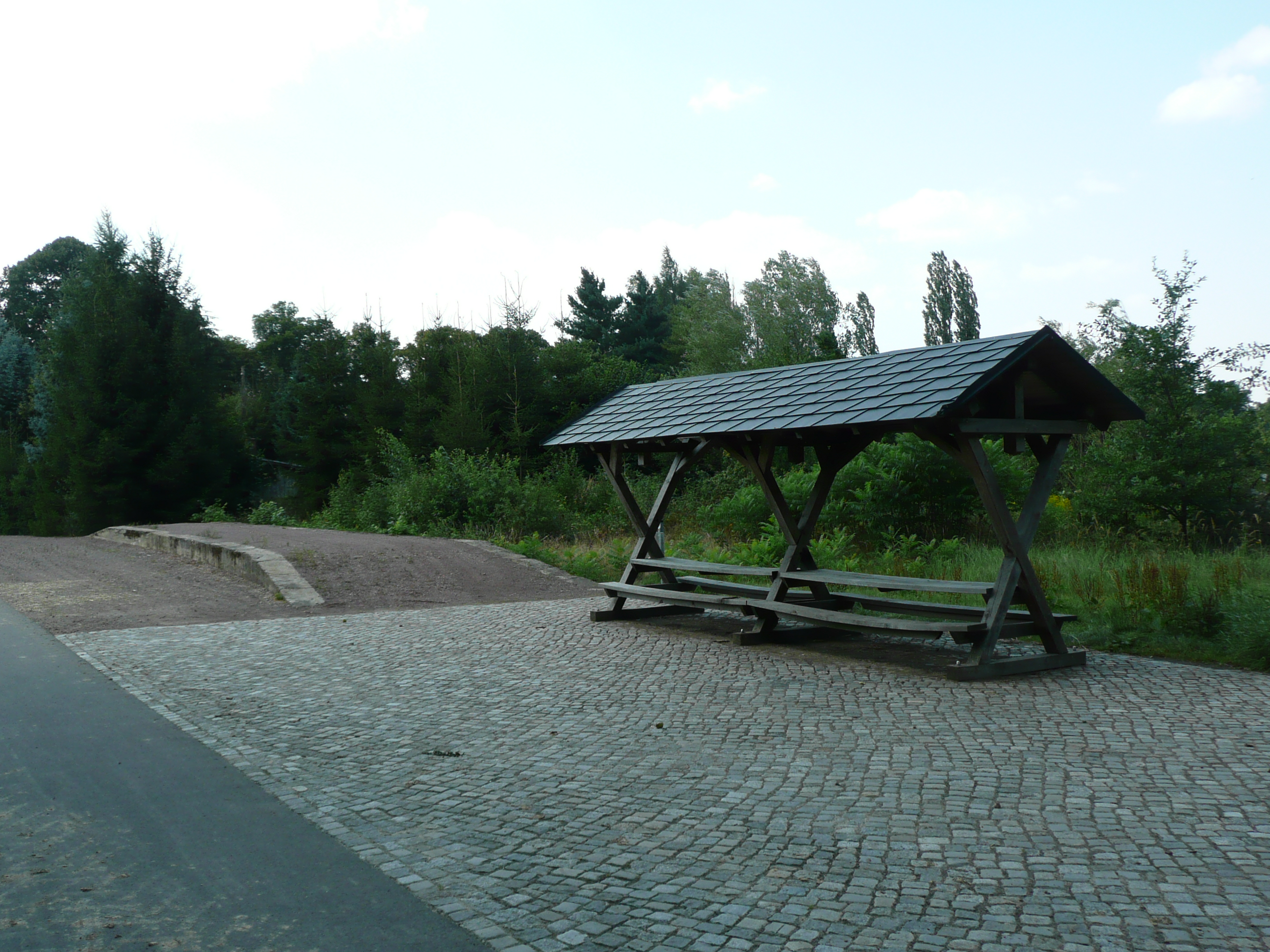 erhaltene Laderampe der Station Birkenhain-Limbach der ehemaligen Kleinbahn Wilsdruff-Nossen